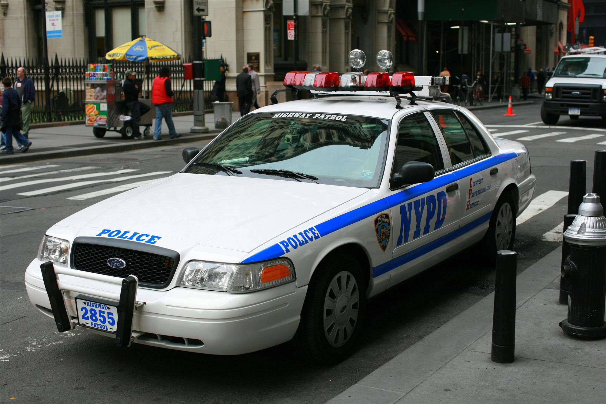 Ford Crown Victoria - radiowóz nowojorskiej policji